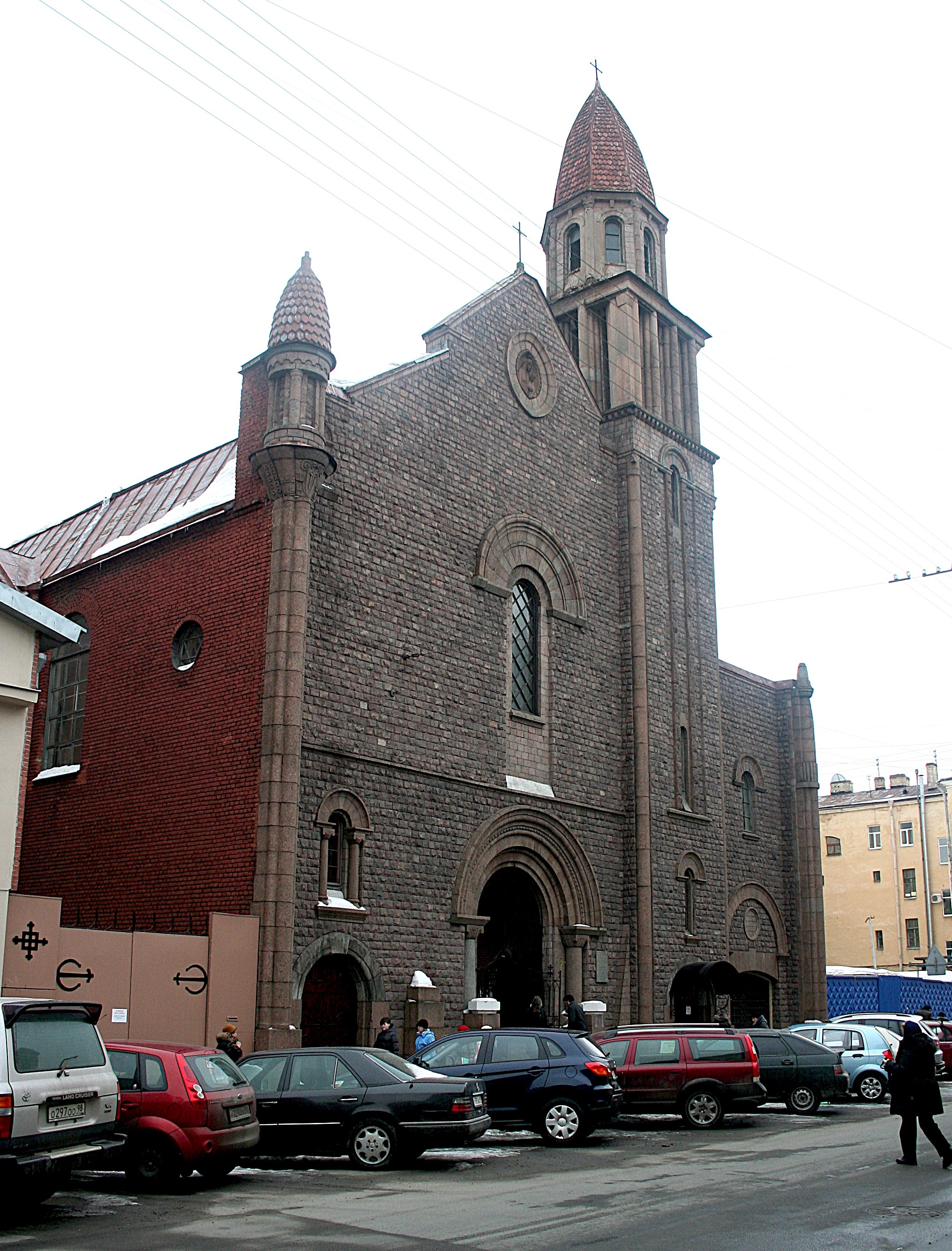 Костел французского посольства (Санкт-Петербург и Лен.область, Санкт-Петербург, ковенский переулок (быв. хлебный), 7)